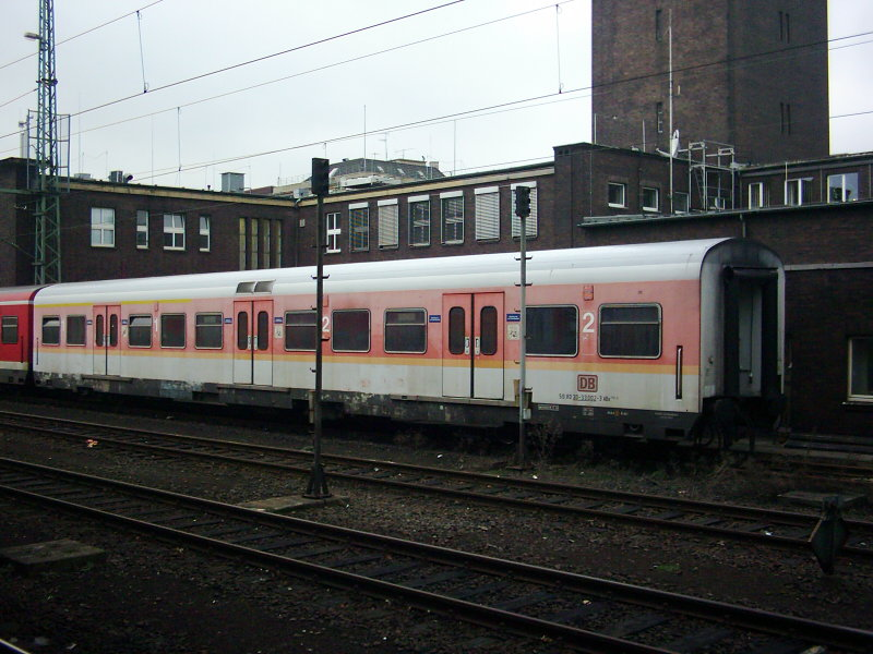 X-Wagen in der Lackierung der späten Bundesbahnzeit (ab 1987), abgestellt auf dem Düsseldorfer Hauptbahnhof.